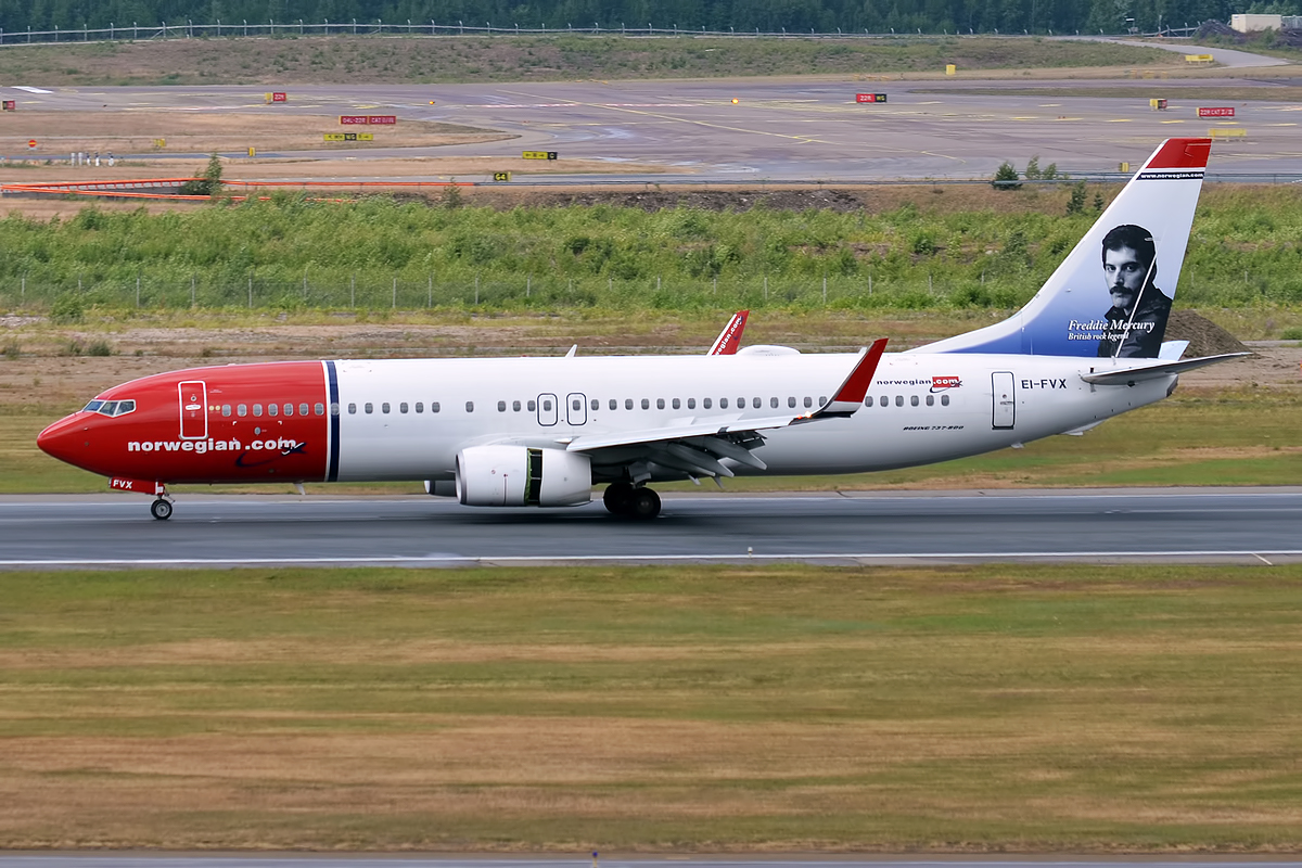 Norwegian, EI-FVX, Boeing 737-8JP